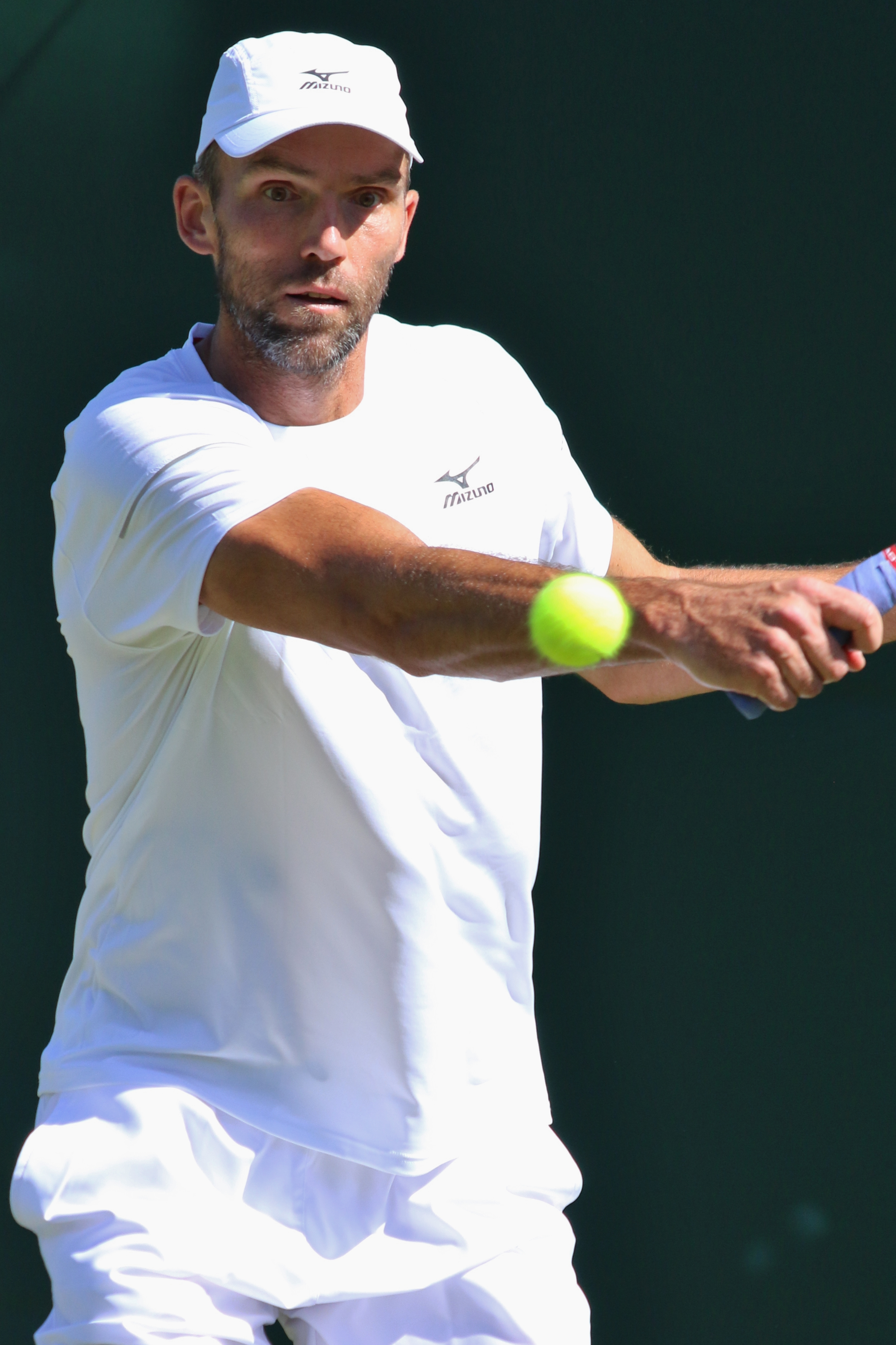 Karlovic WM18 (5)